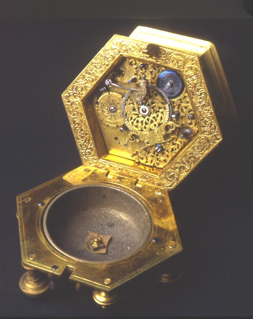 Cassa esagonale in ottone con piedini a cipolla. Aperture finestrate ai lati. Quadrante in ottone argentato con indicazione delle ore in caratteri romani a fondi abbassati. Lancetta a lancia non pertinente. Movimento con bariletti fissi o rotanti. Scappamento a verga regolato da bilanciere. Ponte bilanciere a un piede inciso e traforato con controperno in rubino. Suoneria delle ore con ruota partitora e sveglia.